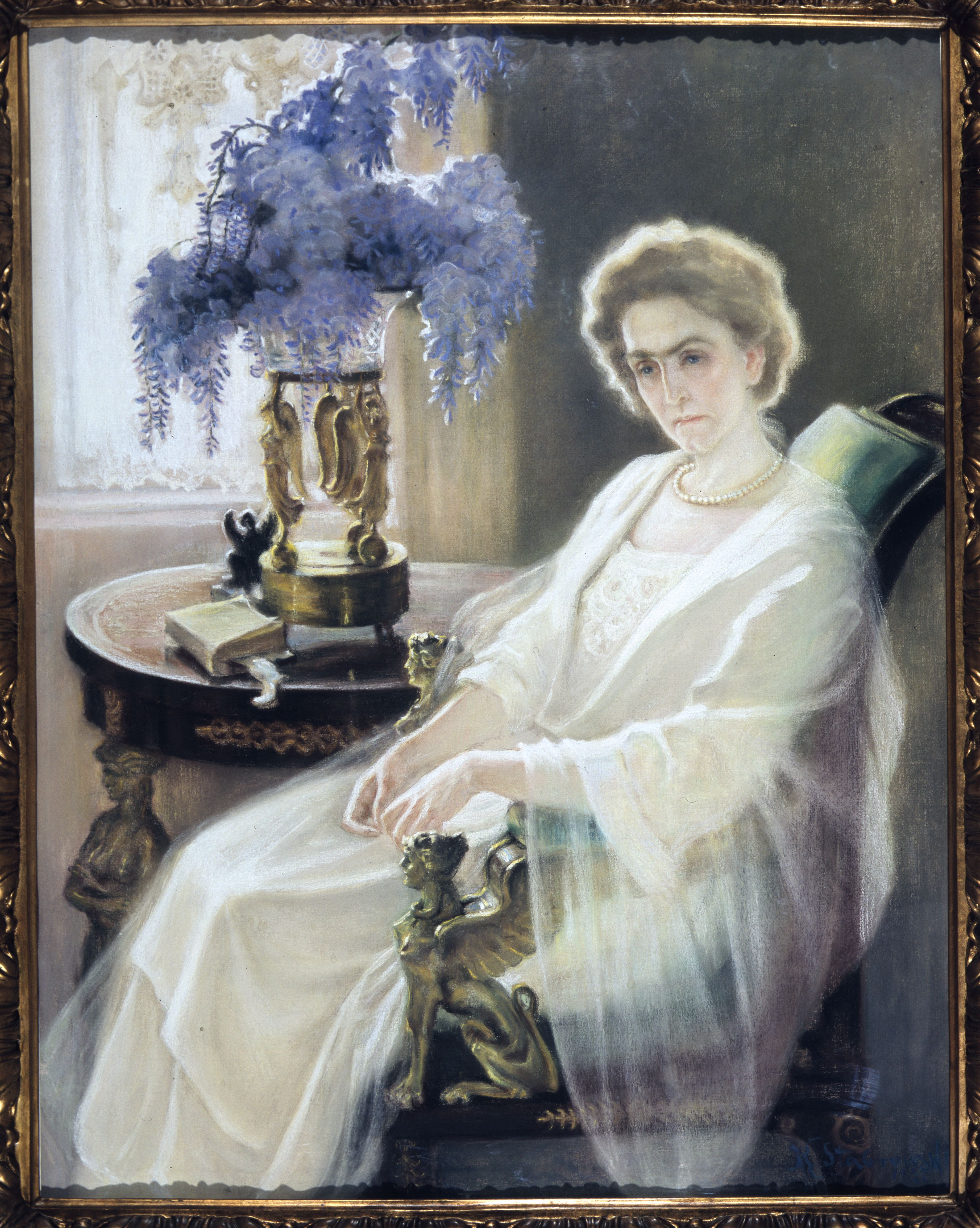 Portret Eugenii Kierbedź — fundatorki Biblioteki Publicznej